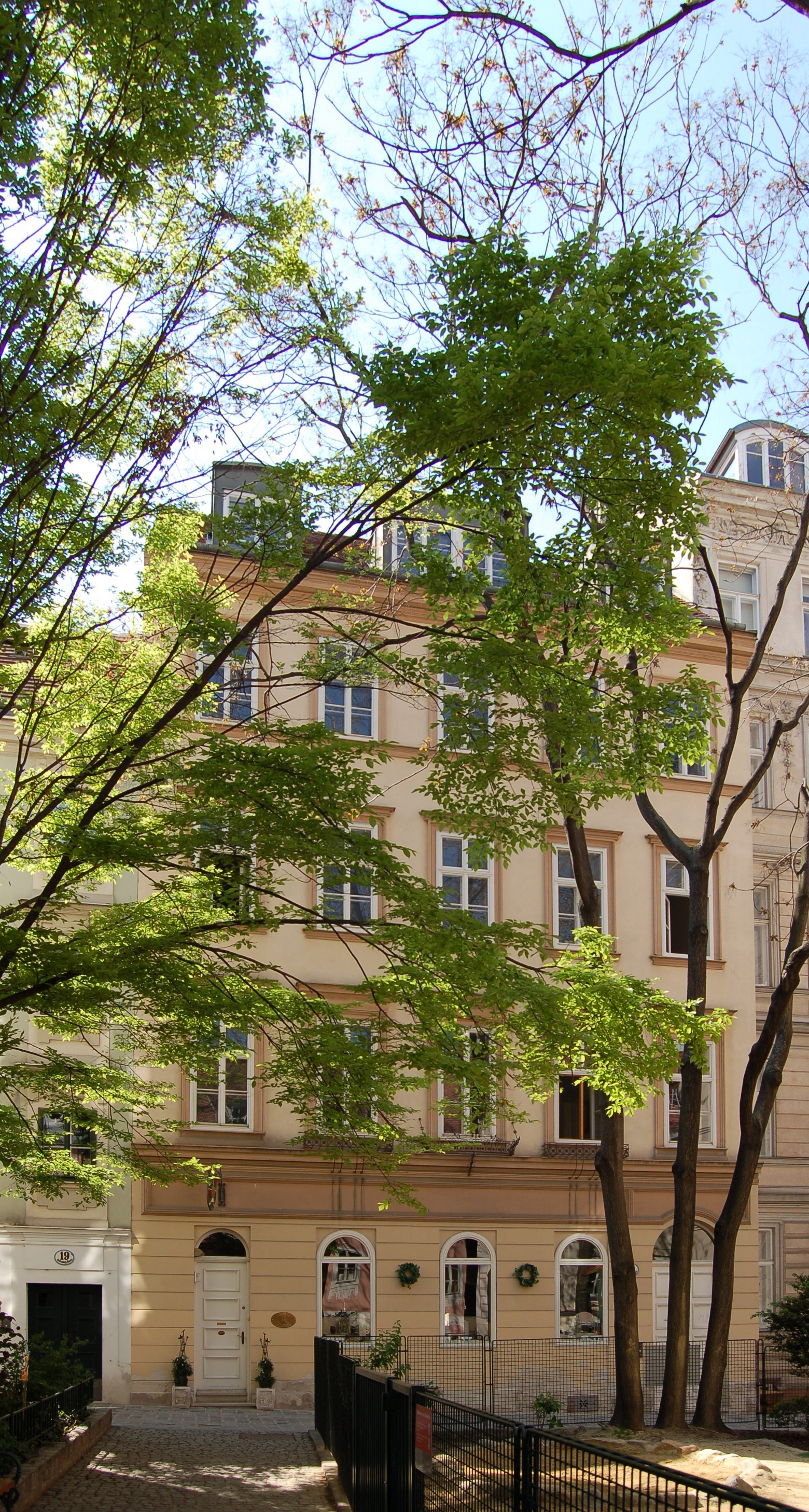 Das denkmalgeschützte Miethaus "Zum weißen Stern" bzw. " Zum steinernen Christkindln" in der Gutenberggasse 21 in Wien-Neubau.